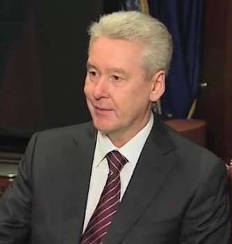 De Sergei Semjonowitsch Sobjanin.